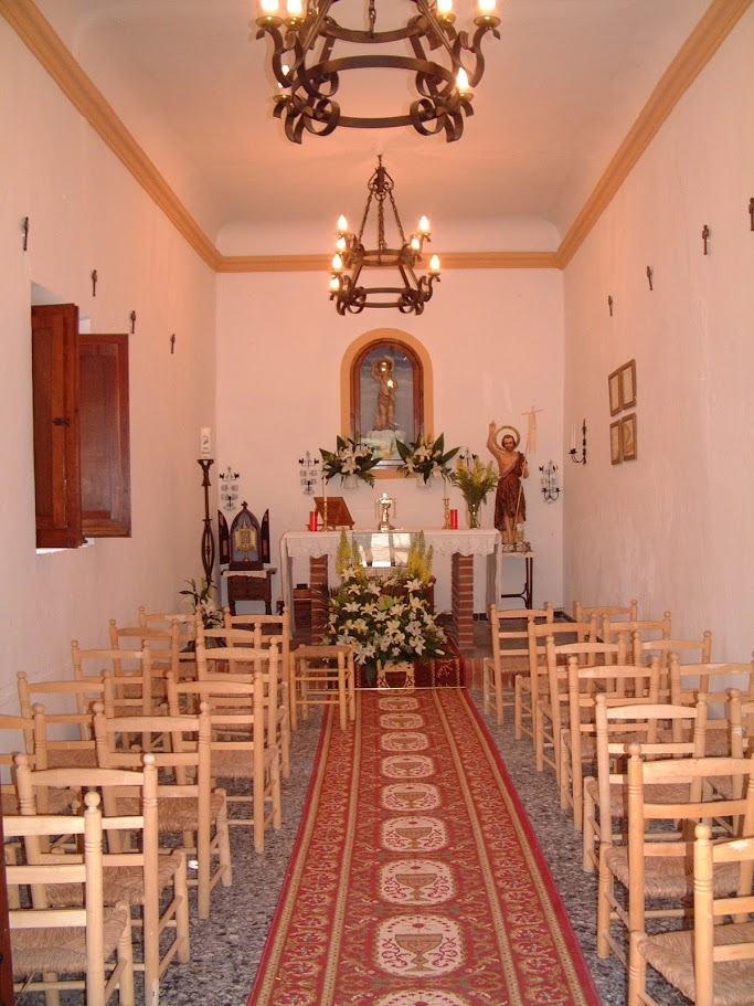 Interior de l'ermita en l'actualitat (2017)